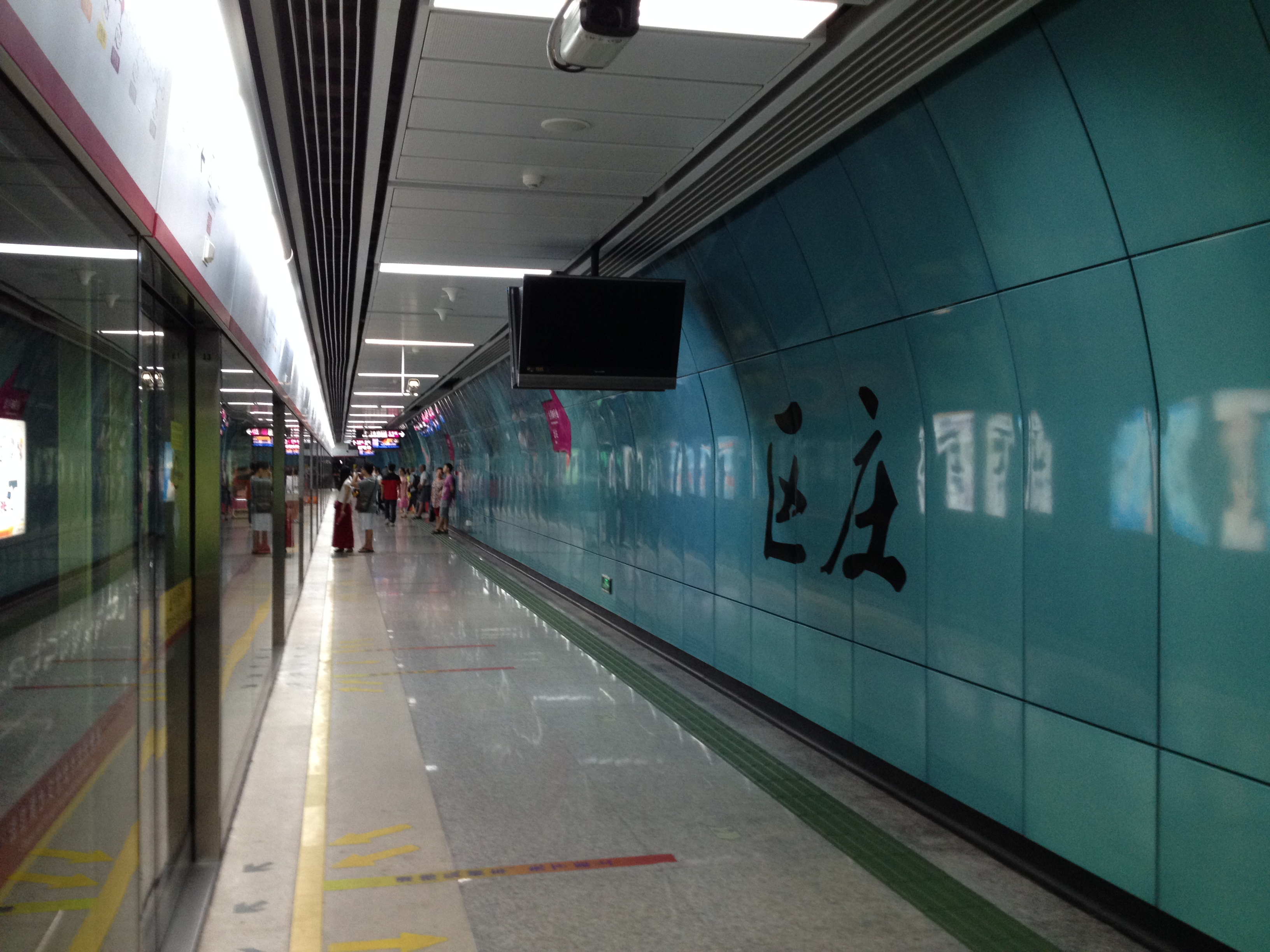 广州地铁5号线区庄站站台